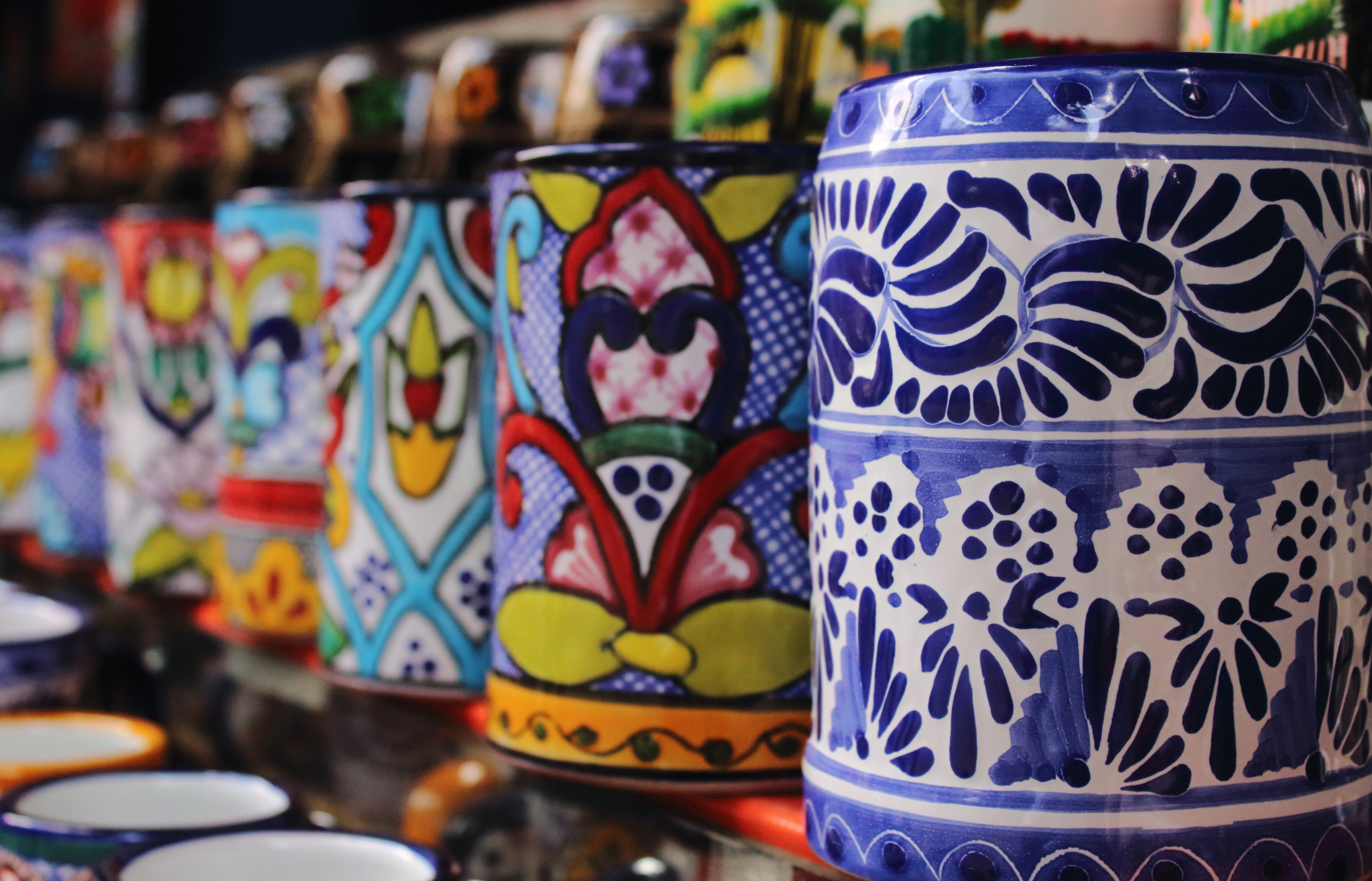 Artesanías típicas del estado de Puebla, México.